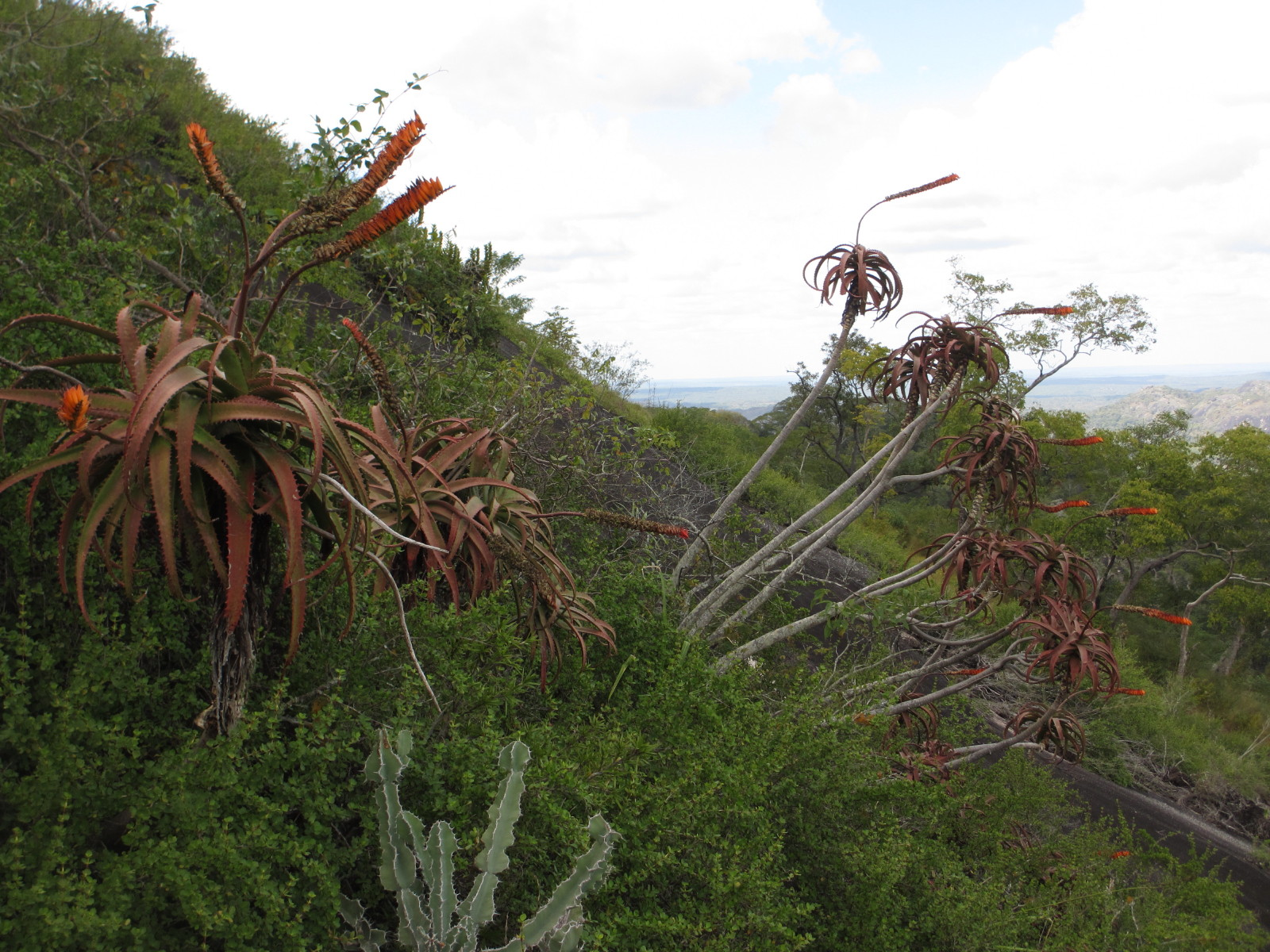 Aloe mawii - shrubs